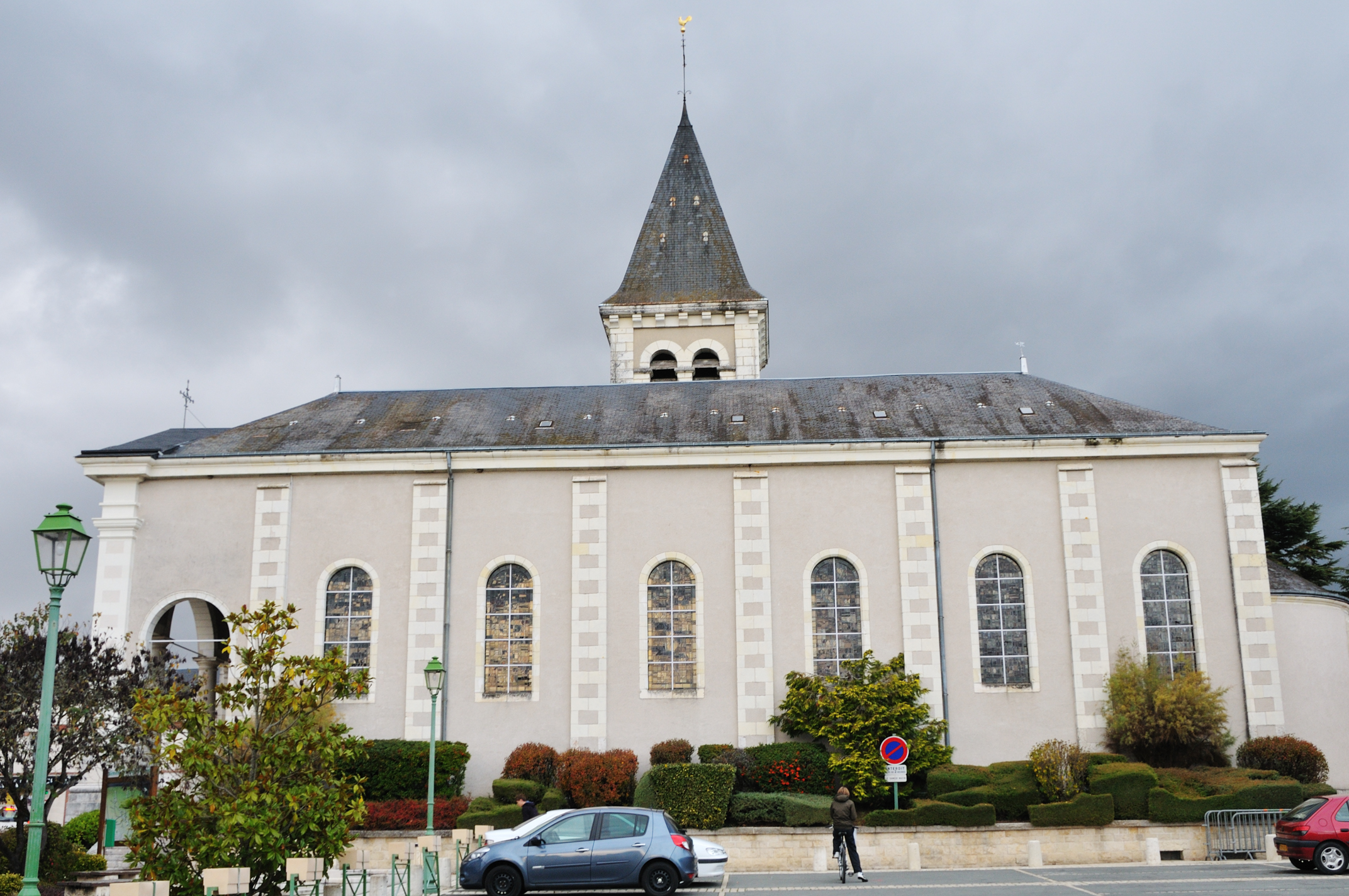 Église Saint-Denis, Neung-sur-Beuvron, Loir-et-Cher, France